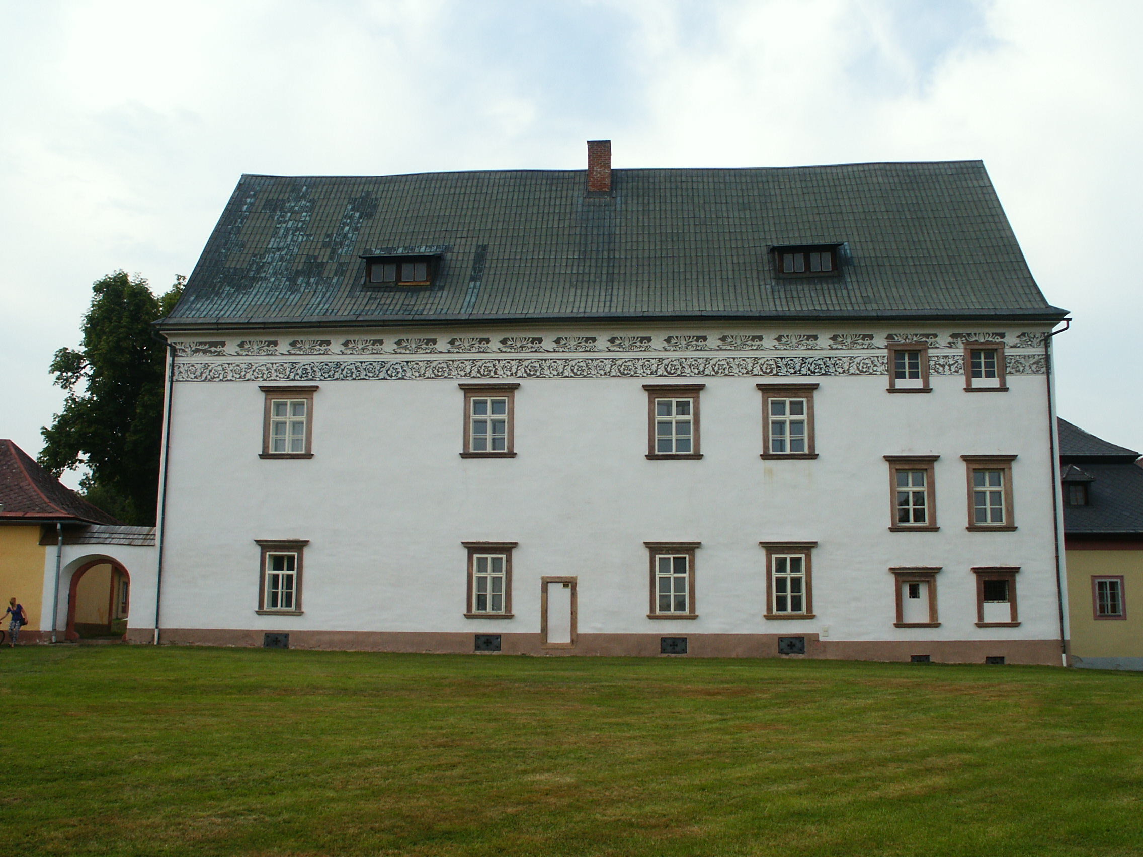 Zámek Horní Branná, Horní Branná 1 - JJV fasáda